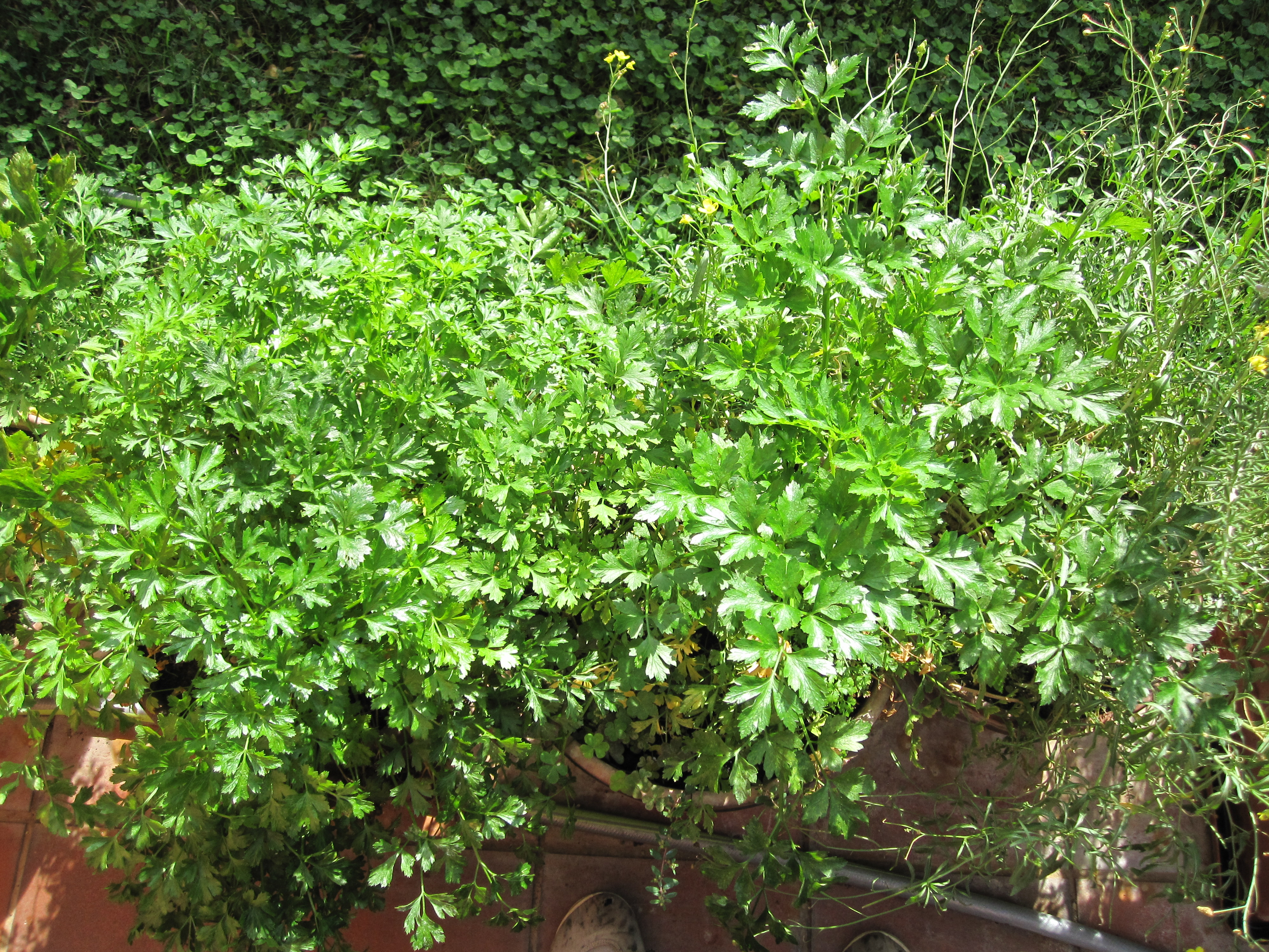 Piante di petroselinum sativum (a foglie piccole e grandi) in vaso